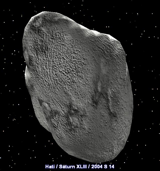 Programmi Celestia koostatud pilt Hatist.